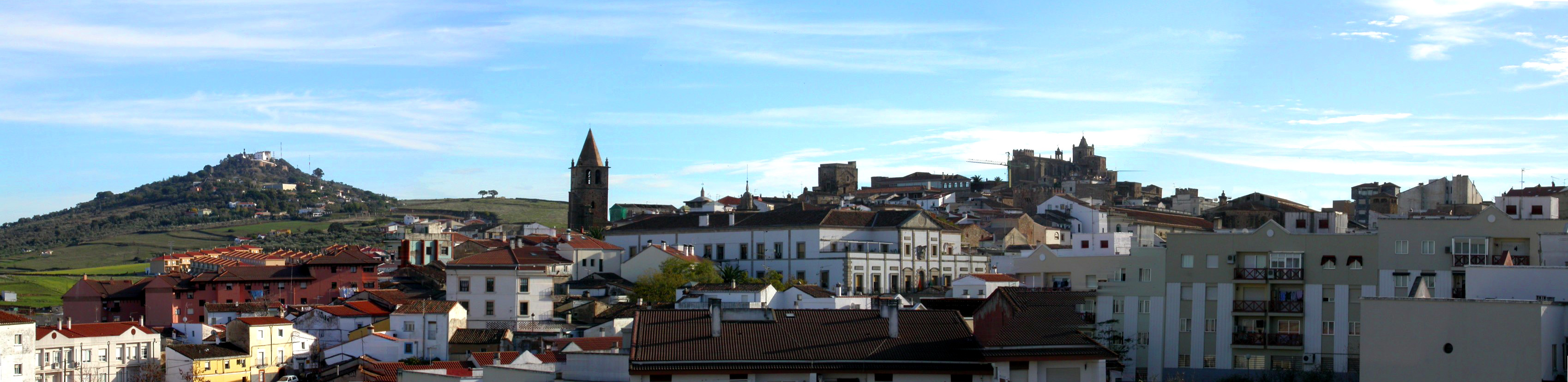 Cáceres na Spáinne